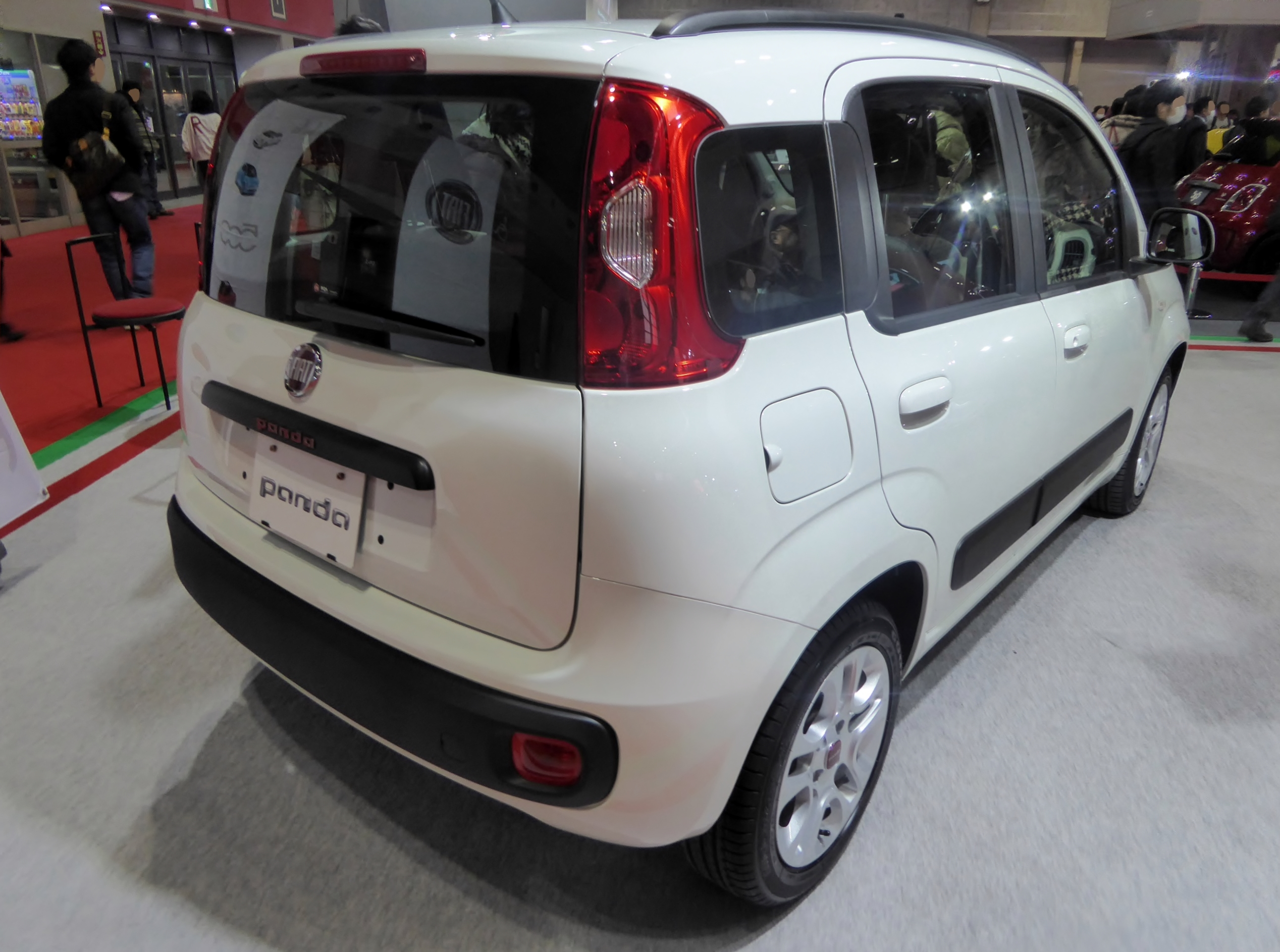 大阪モーターショー2015においてABA-13909型フィアット・パンダイージーを撮影。